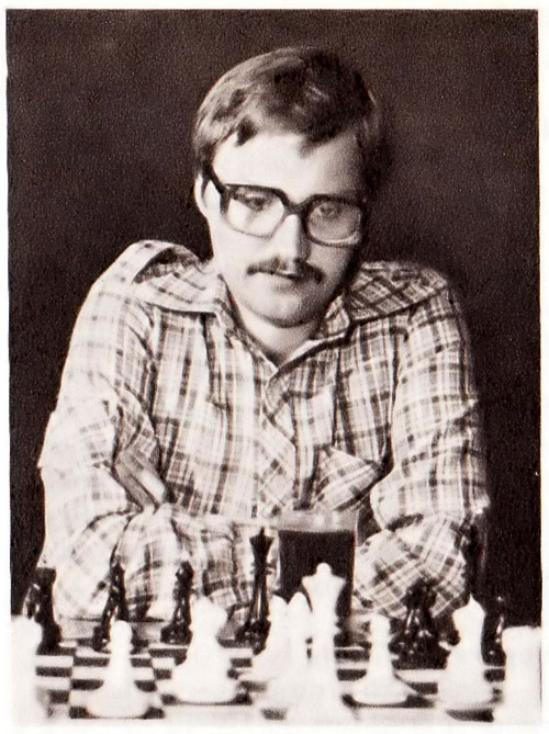 Jerzy Pokojowczyk (ur. 21 lutego 1949 w Walimie) – polski szachista, mistrz międzynarodowy od 1978 roku.